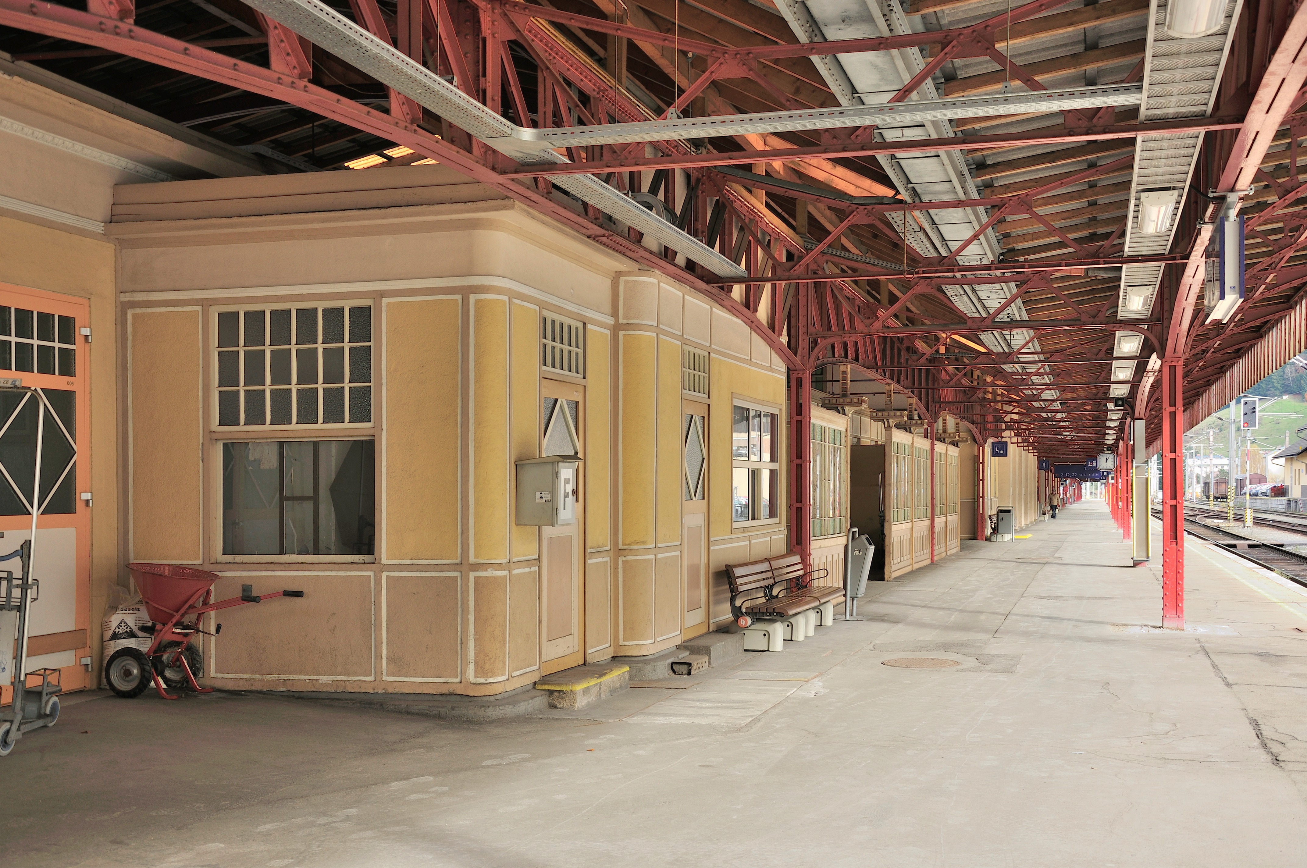 Inselbahnhof Selzthal (Mittelbahnsteig)